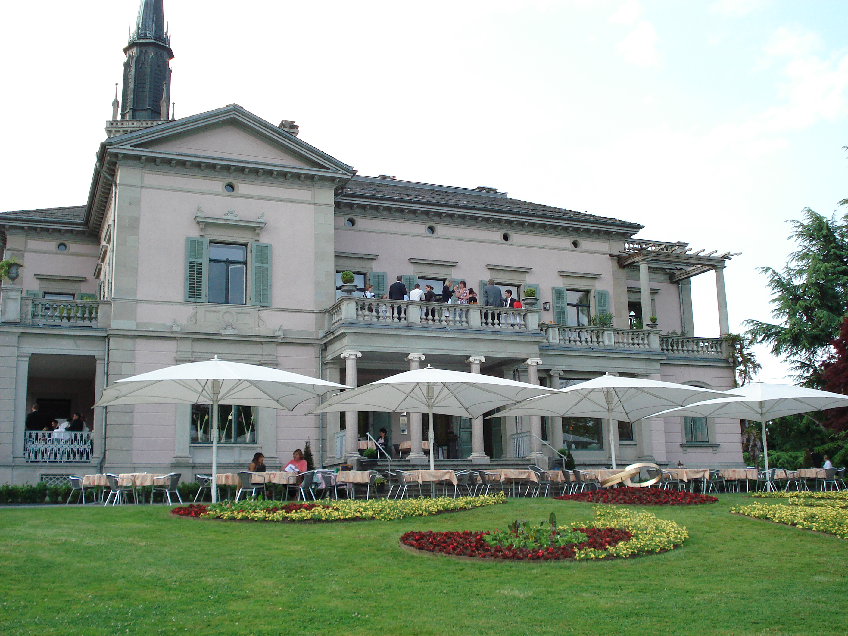 Villa Villette (Restaurant), Cham, ID 1357a